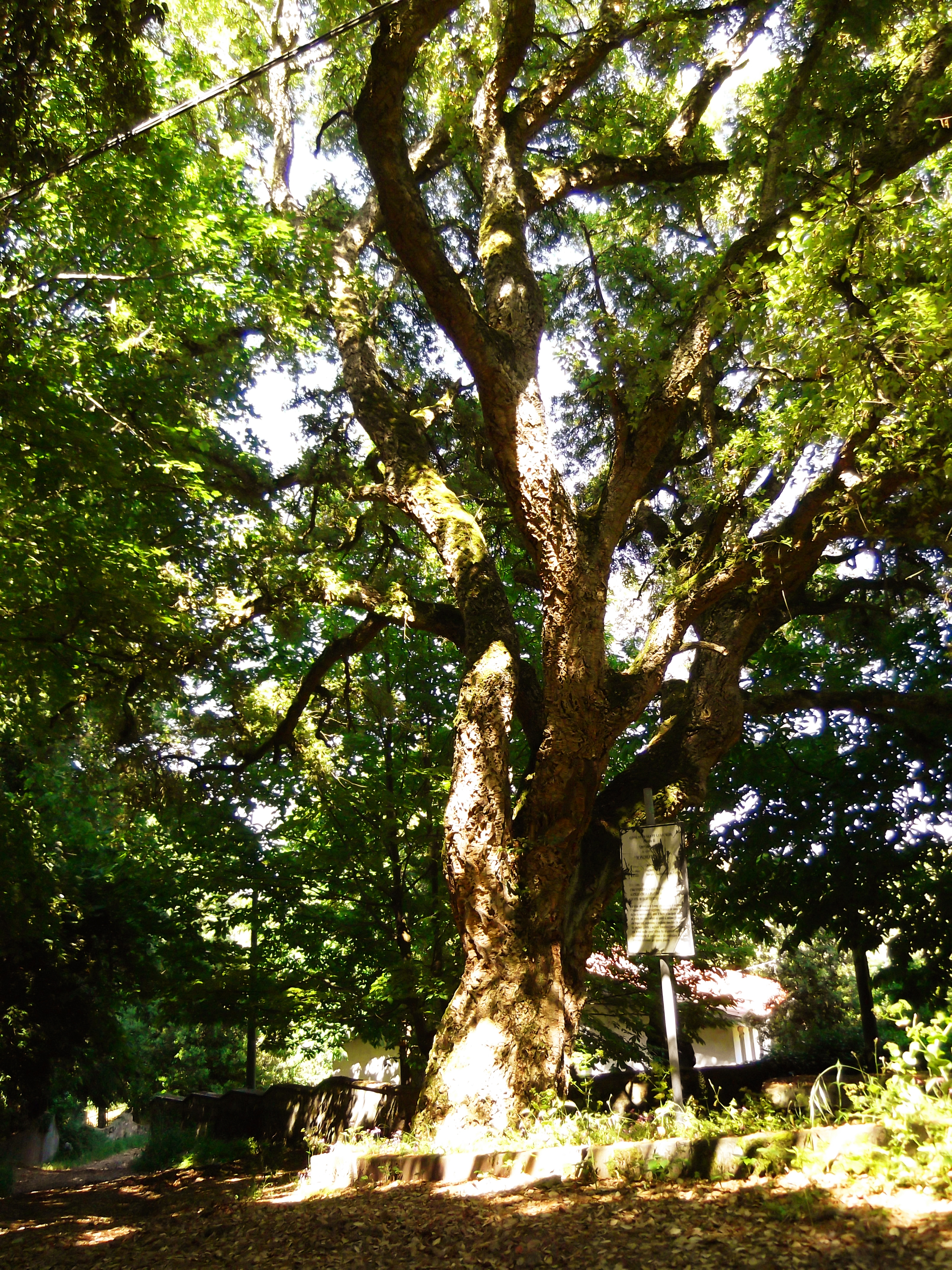 Quercia da sughero secolare. Una datazione prudente indica un'età di oltre 250 anni. Da oltre 60 anni non è stato più estratto il sughero e la corteccia ha assunto la caratteristica di sugherone (o sughero maschio). Situata nell'abitato di San Leonardo de Siete Fuentes (Santu Lussurgiu) in via dell'Agrifoglio alla quota di 690 mslm. Altezza dal suolo: 15 metri Diametro: 338 cm